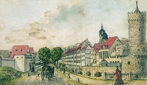 Jena, Fürstengraben von Westen, 1792. Radierung, koloriert.